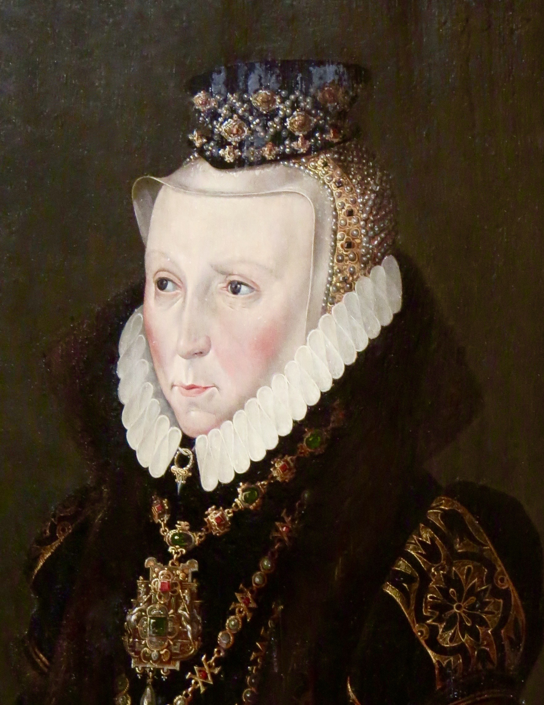 Elisabeth av Danmark, hertuginde av Meklenborg-Schwerin, olje på træ af Cornelius Krommeny (-1599), Güstrow Slot.